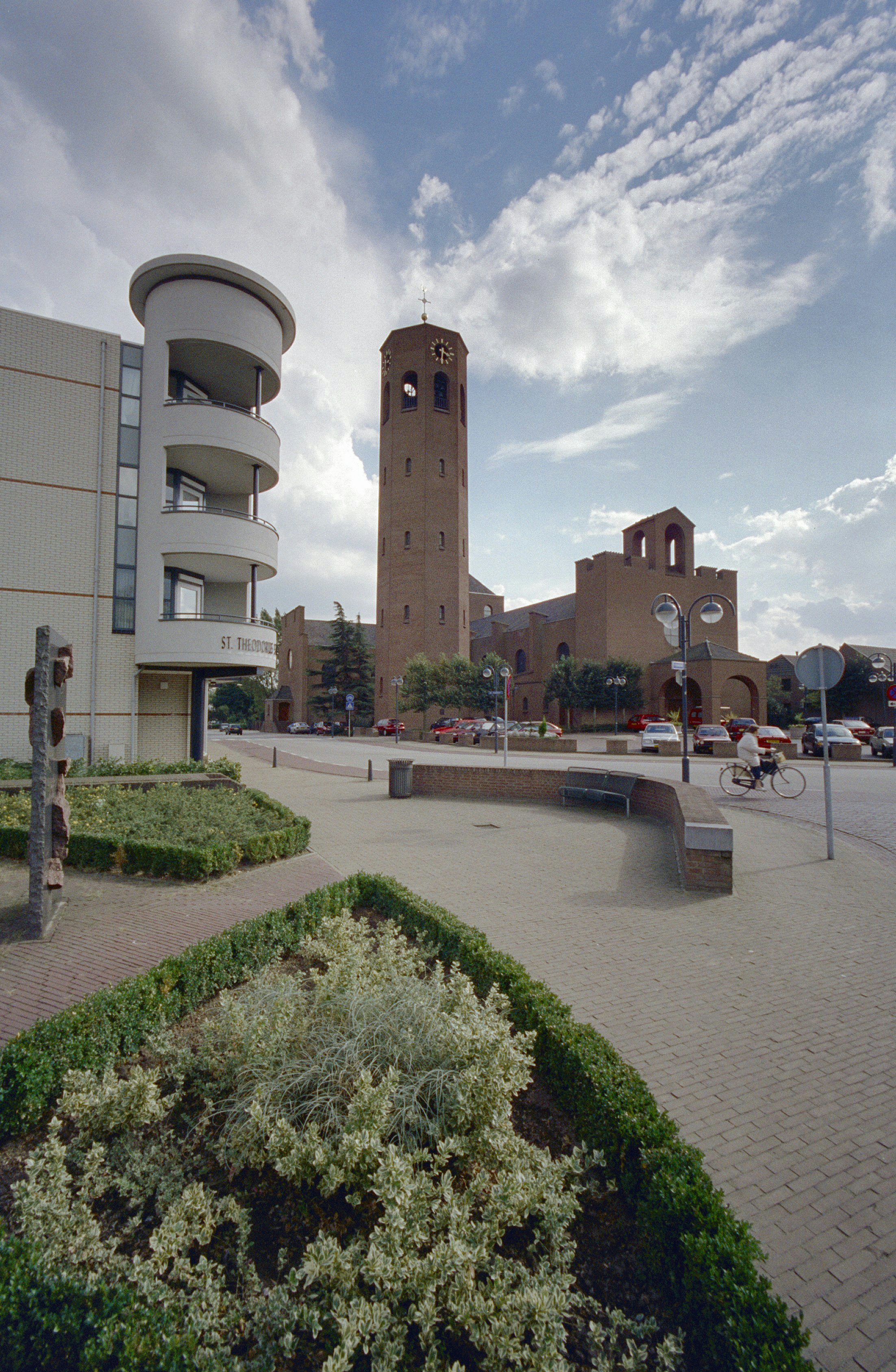 Onze Lieve Vrouwe Ten Hemelopneming: Exterieur kerk met ruime omgeving